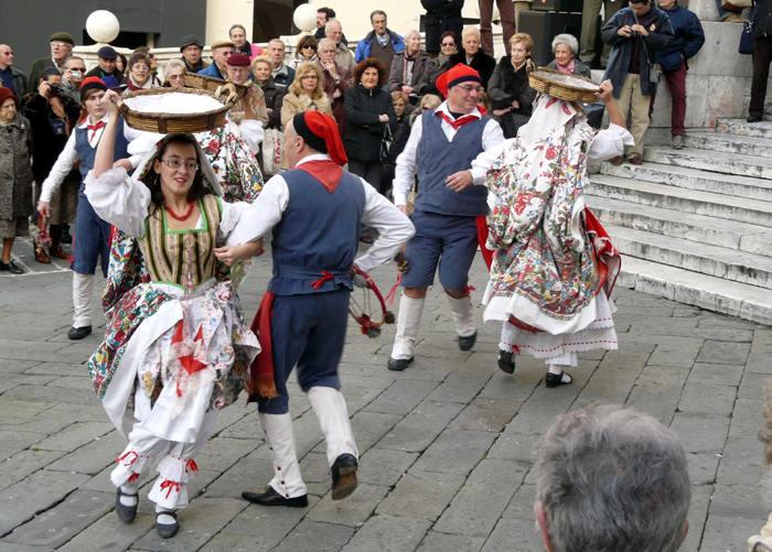 Gruppo folclorico riproponando i canti e le danze popolari della vecchia Genova. Notare la ricchezza del costume tradizionale delle donne, completato dal mezzaro drappeggiato a modo di scialle.